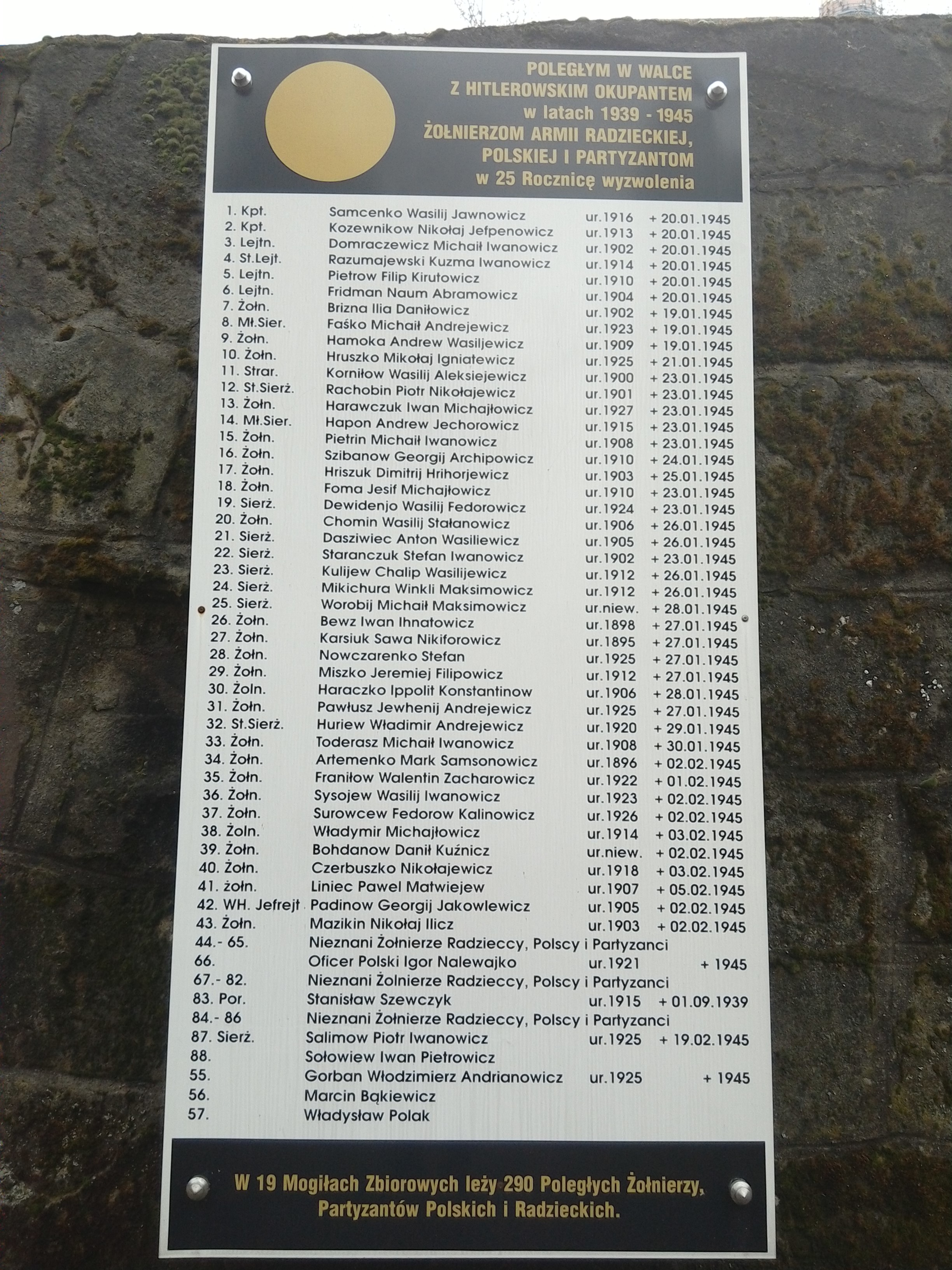 Tablica cmentarza wojennego, Gorlice ul.Wincentego Pola